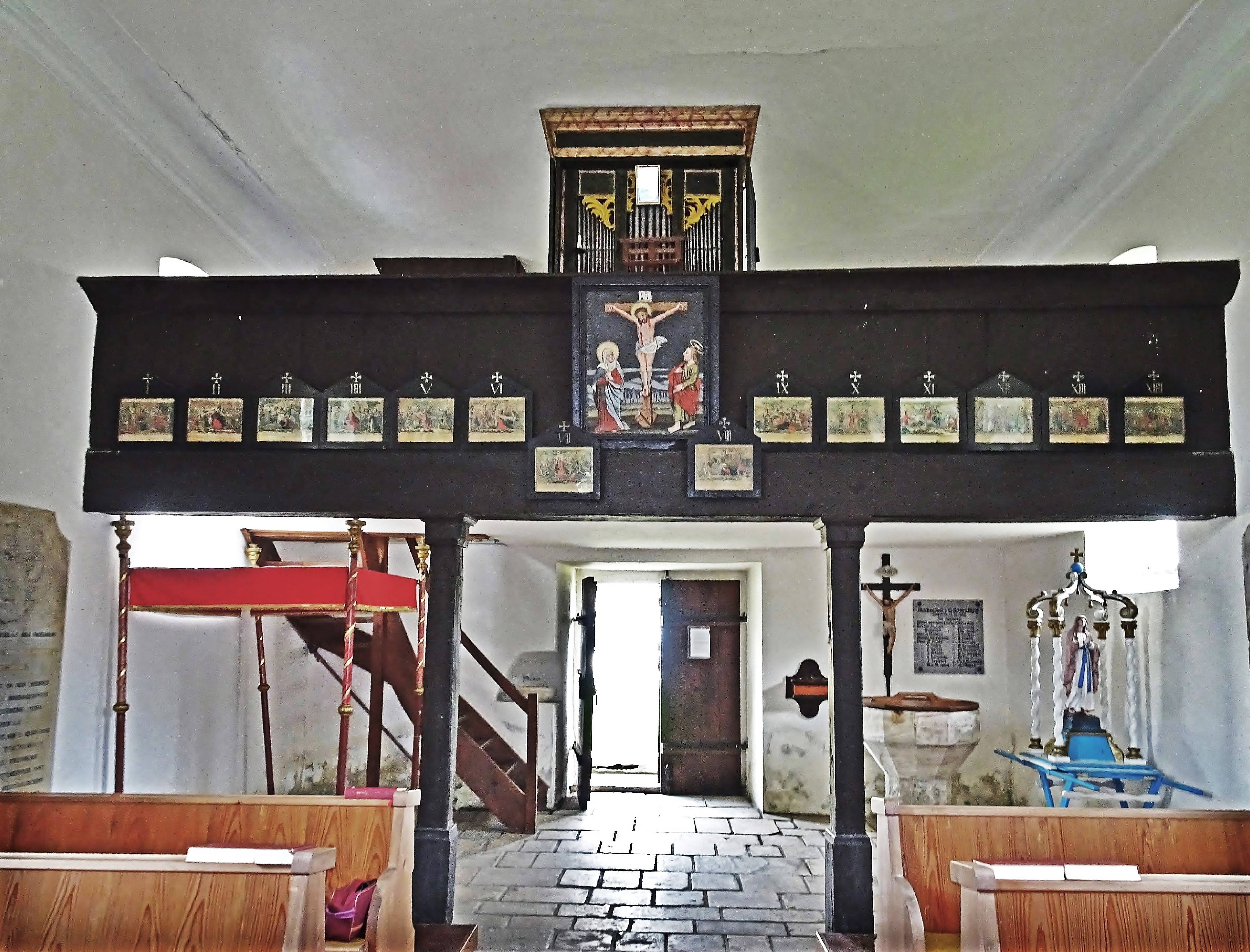 Kath. Filialkirche St. Peter am Bichl, Westempore mit Orgel